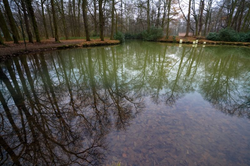 Park Middelheim in Belgium